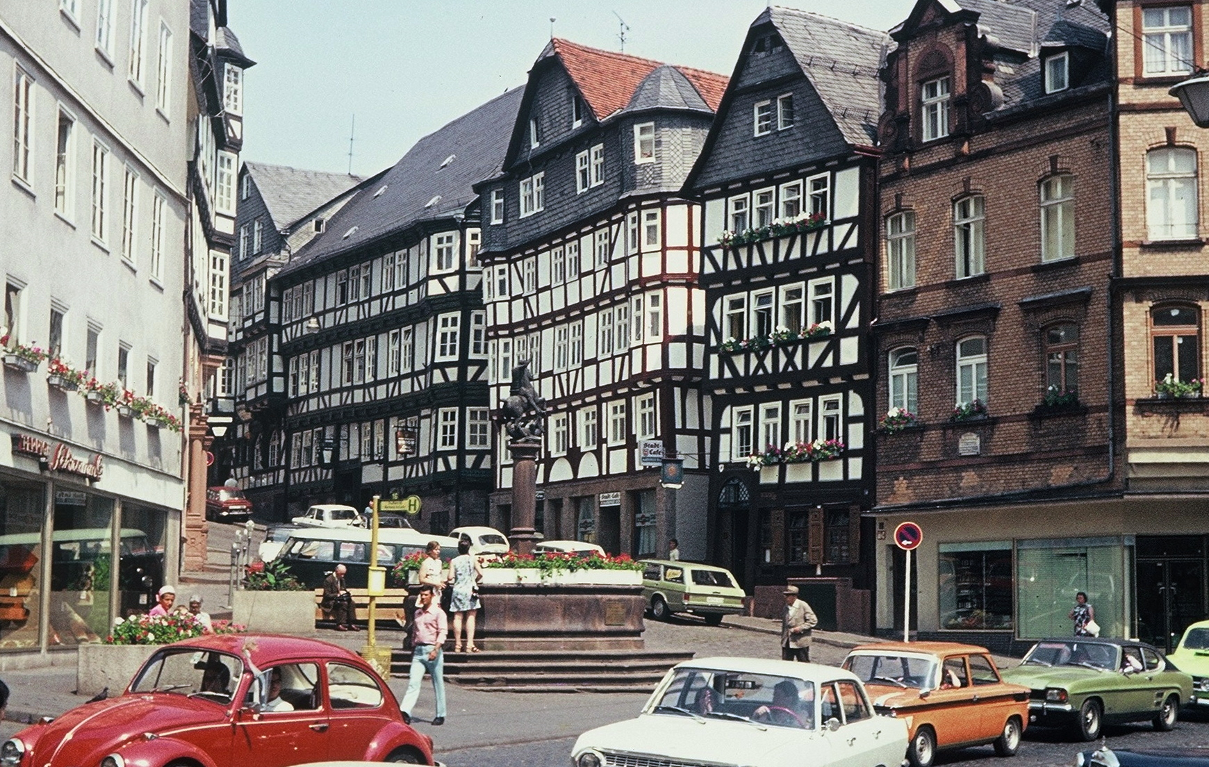 Marburg (Lahn). Marktbrunnen, Aufnahme von 1972.